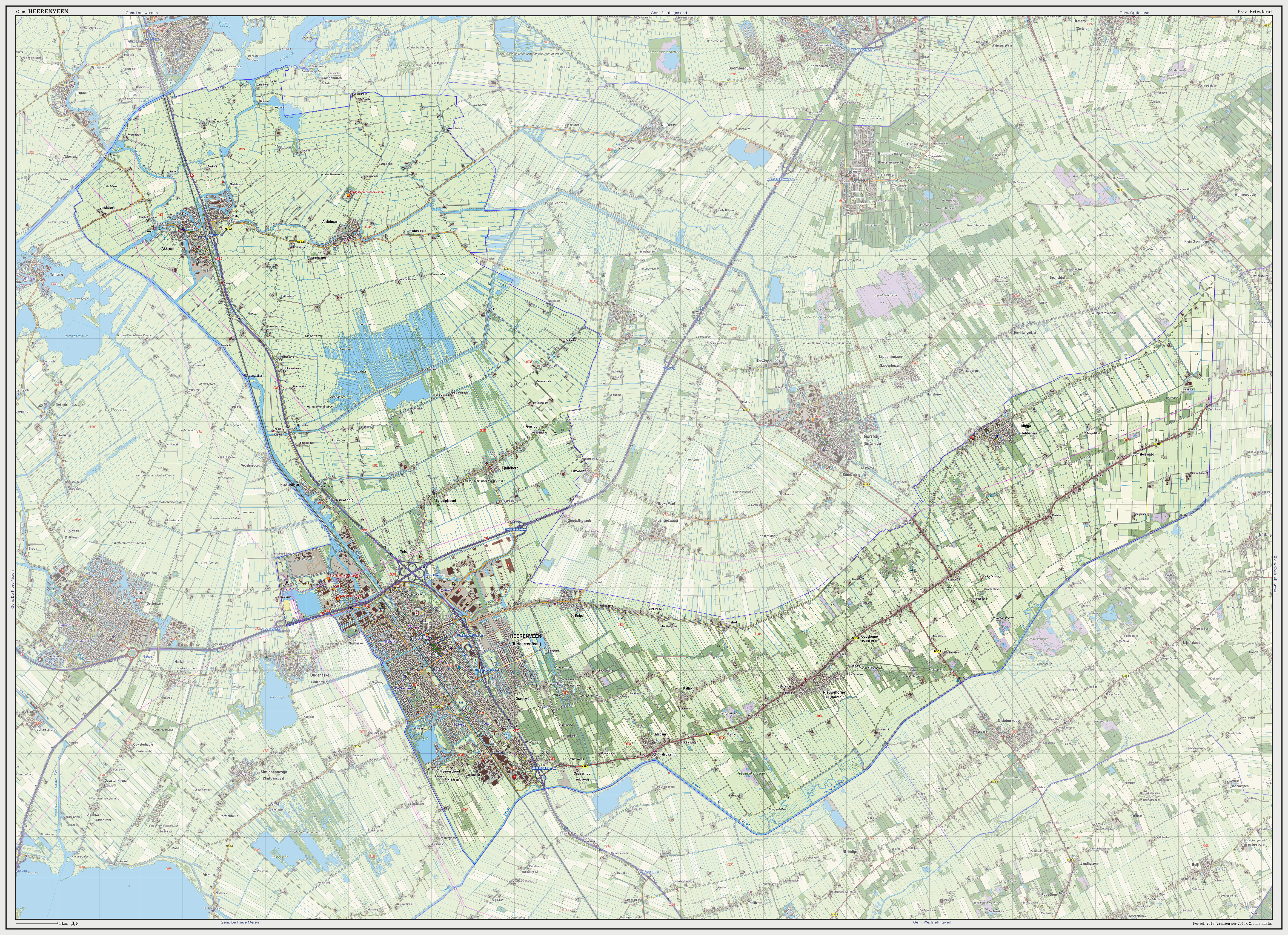 Topografische kaart van gemeente Heerenveen (2013). Samengesteld door Jan-Willem van Aalst op basis van de GML open geodata van de BRT/Top10NL (basisregistratie Topografie, Kadaster 2011), vrijgegeven door Kadaster onder de Creative Commons BY licentie. Additionele gegevens uit BAG (8 juli 2013), uit de Open Street Map (9 juli 2013) en uit de Risicokaart. Peildatum kaartbeeld: 9 juli 2013. Zie ook Gemeentenatlas.nl Samenstelling en kleurenschema: Jan-Willem van Aalst, met QuantumGIS en Photoshop. Zie ook de Legenda.